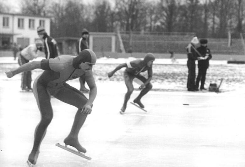 Jörg Mademann, Roland Vetter ADN-ZB Settnik 15.2.81 Berlin: DDR-Sprintmeisterschaften-Eislauf Start über 500m- Mit Jörg Mademann (TSC) und Roland Vetter (SOT), trafen über 500m zwei Favoriten aufeinander. Roland Vetter (vorn) konnte dabei mit 39,45 s. den Sieg erringen. (Endergebnis siehe ADN-Meldg.)